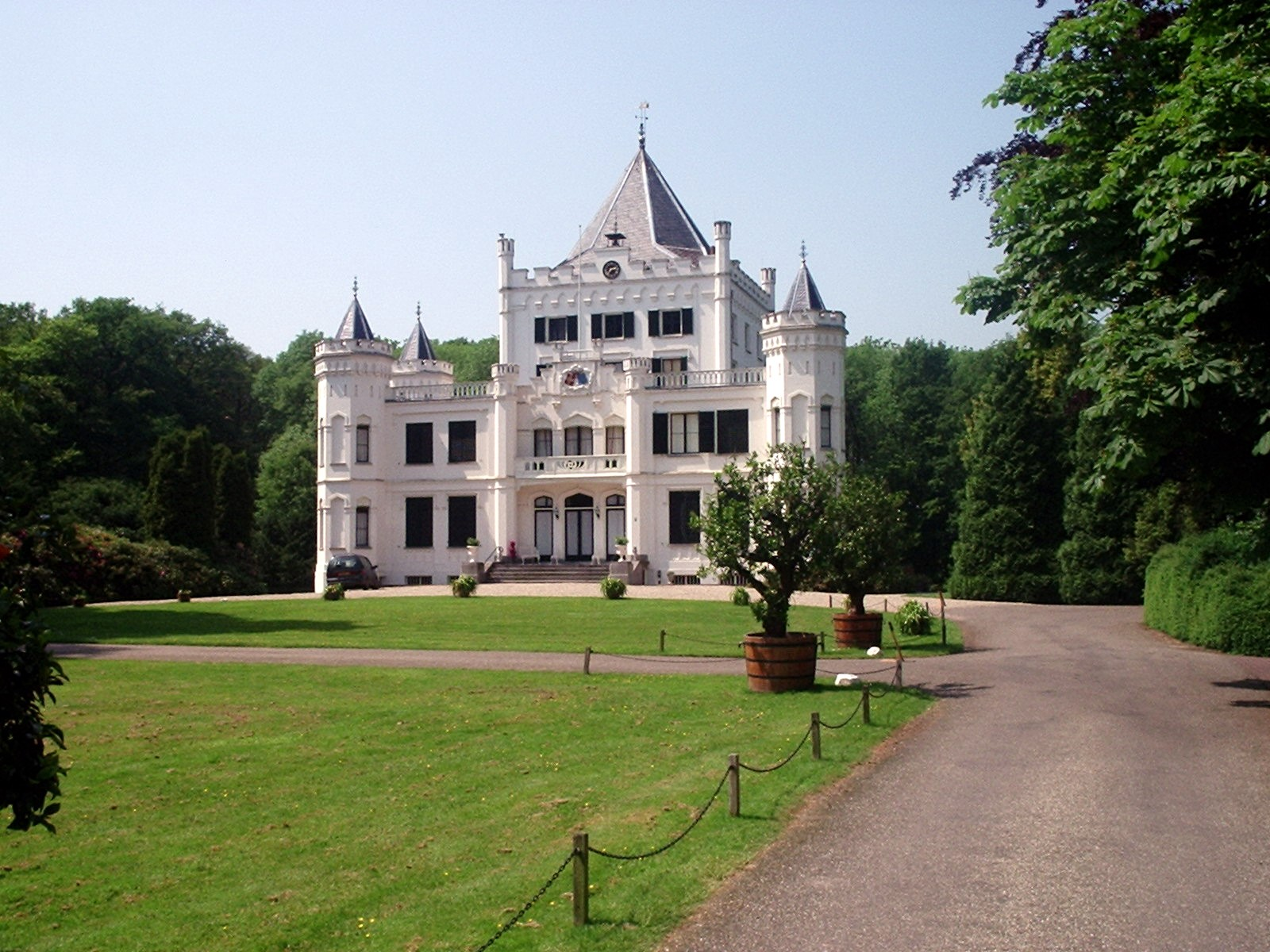 Kasteel Sandenburg in Langbroek, the Netherlands.